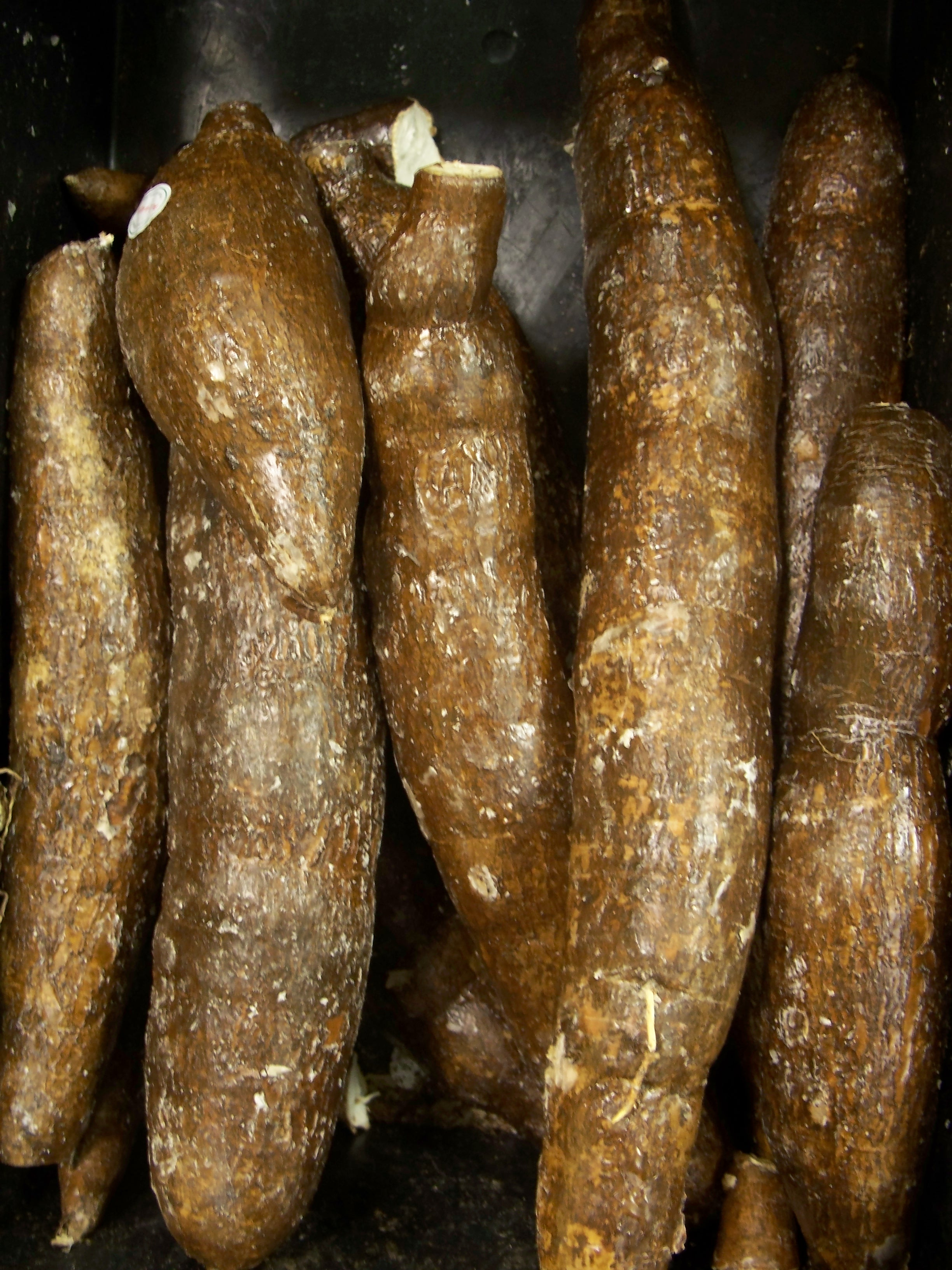 Racine de yucca (manioc)